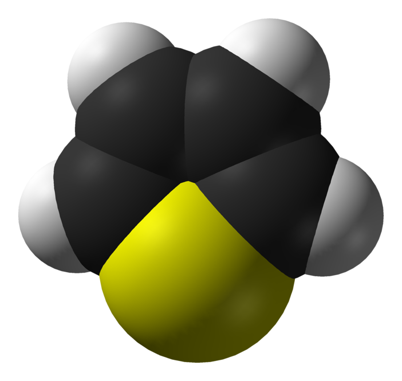 Tiofen 3D